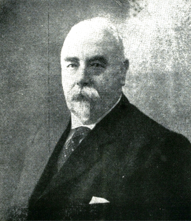 James Thomas Humberstone (Dover, Inglaterra, 8 de julio de 1850 - Iquique, Chile, 12 de junio de 1939) fue un Ingeniero Químico Inglés, que llegó a América en 1875, para trabajar en las oficinas salitreras de Tarapacá, Perú (Actualmente Chile), aportando un importante avance en la industria salitrera. Españolizó su nombre James a “Santiago” (James es la traducción anglosajona para el apóstol Santiago).